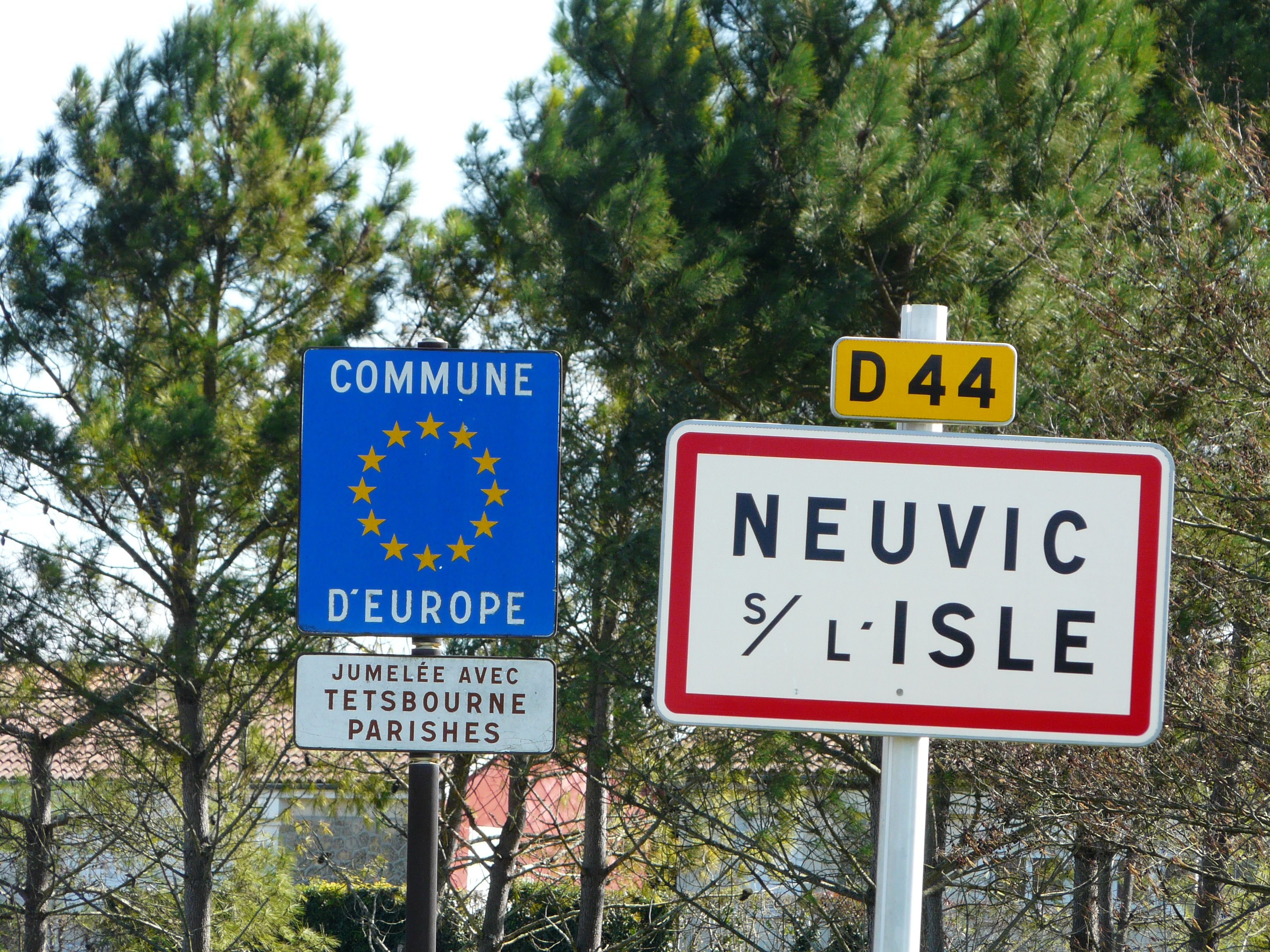 Panneaux d'entrée de ville et de jumelage de Neuvic, Dordogne, France.